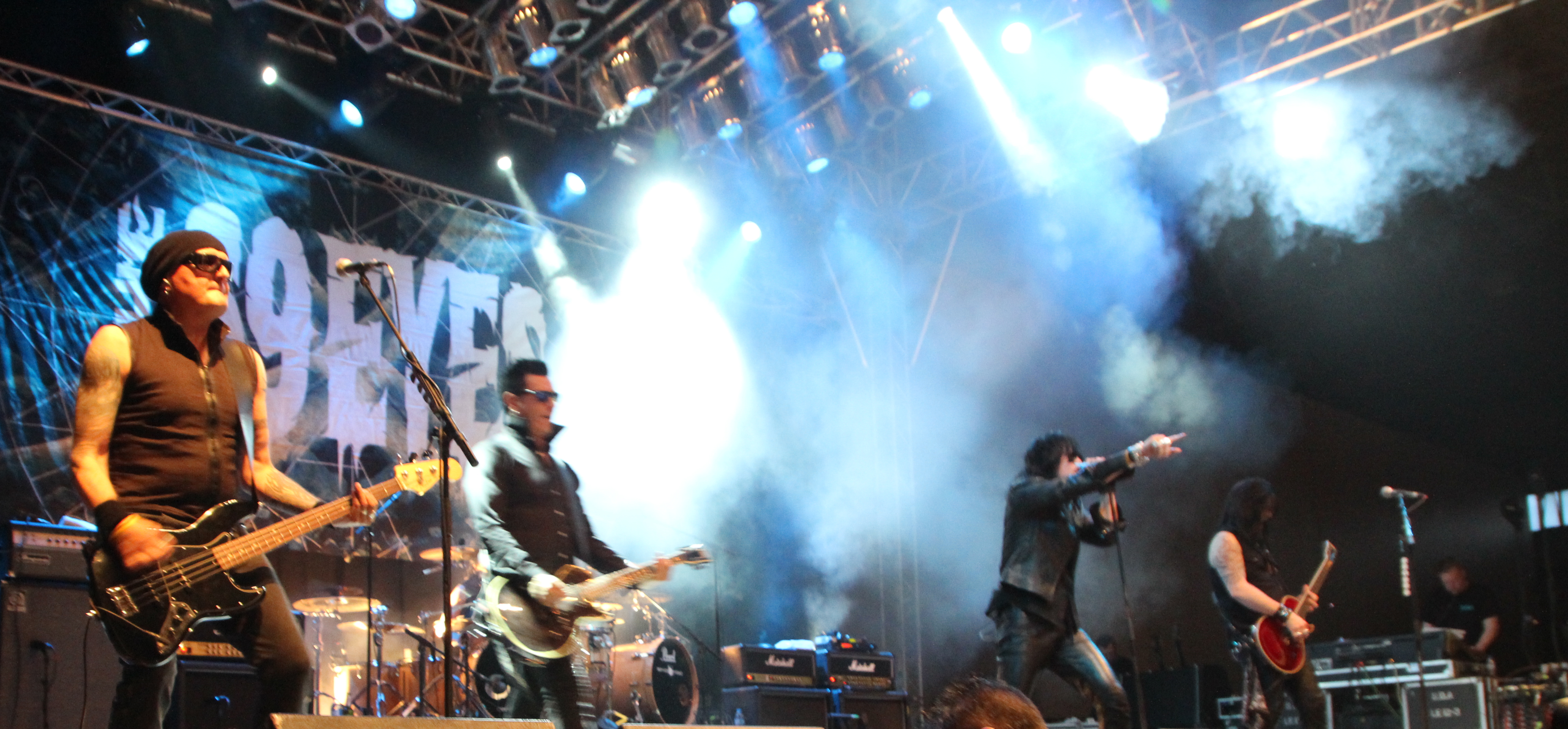 The 69 Eyes auf dem Wave-Gotik-Treffen 2013 in der Agra-Halle.